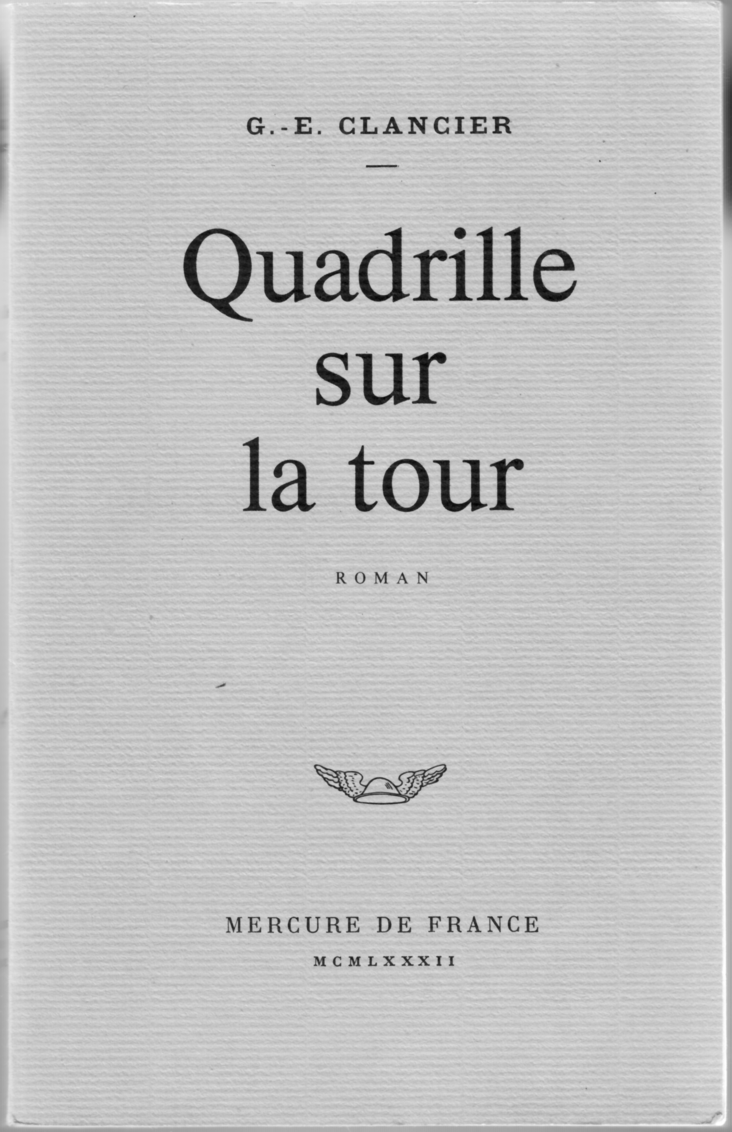 couverture du roman de Georges-Emmanuel Clanier, quadrille sur la tour